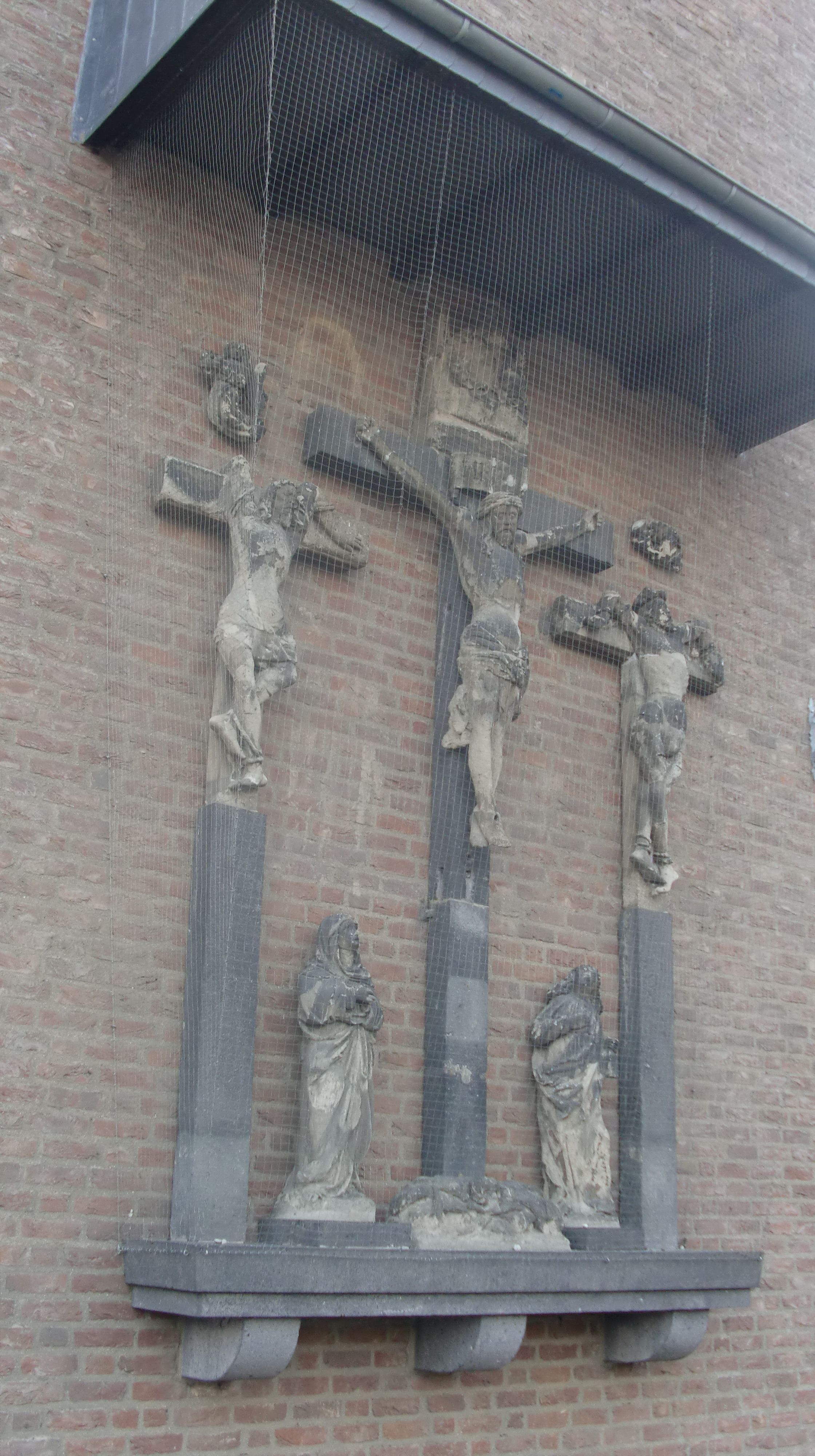 Die Kreuzigungsgruppe in Morken-Harff (neu) wurde mit der Umsiedlung in der neuen Kirchmauer eingebaut.